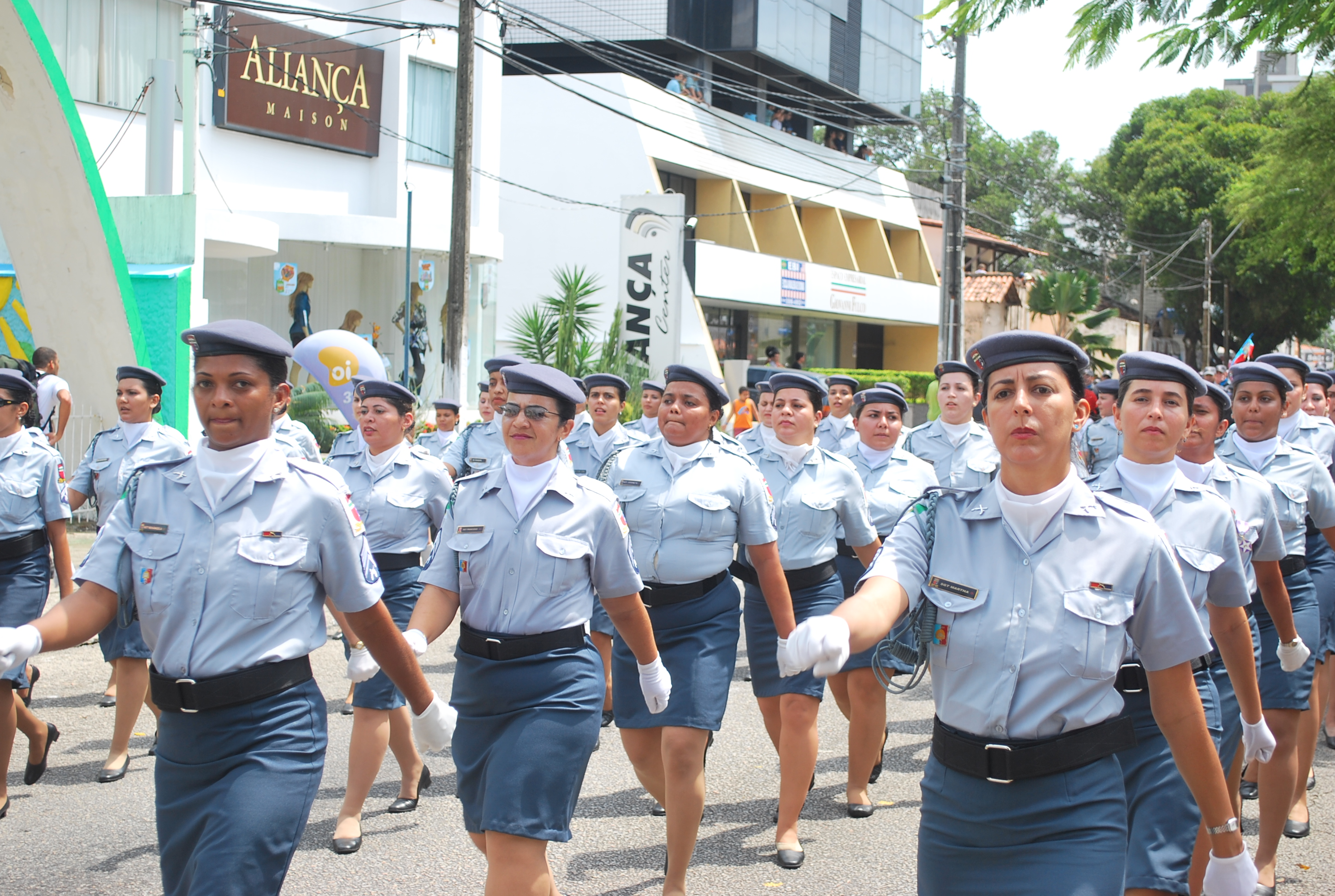 Policiais da Companhia de Policia Feminina - Desfile de 7 de setembro.